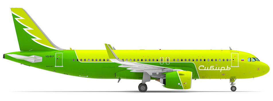 S7 Airlines special livery